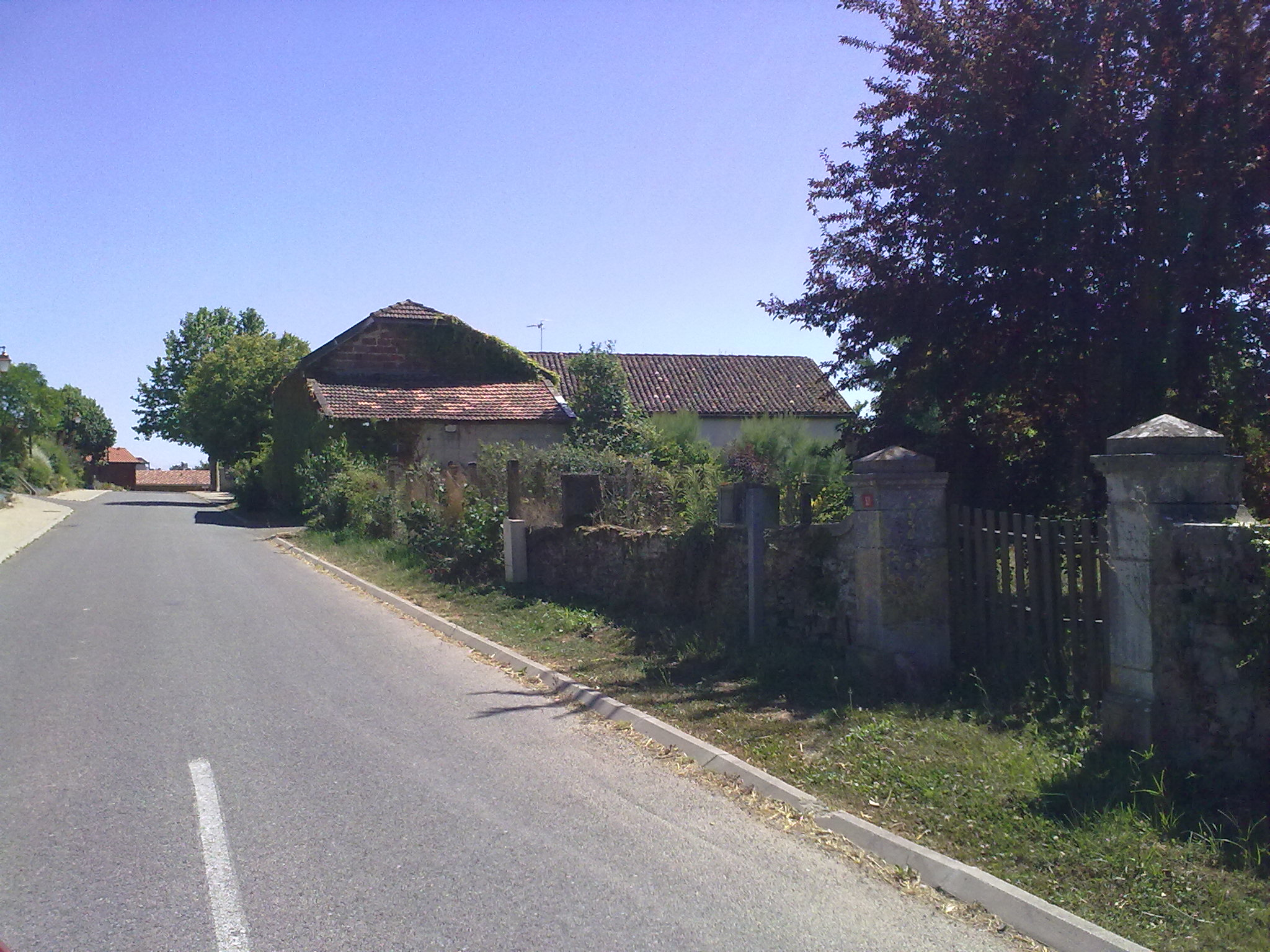 Beyries le 18 juillet 2010, France.